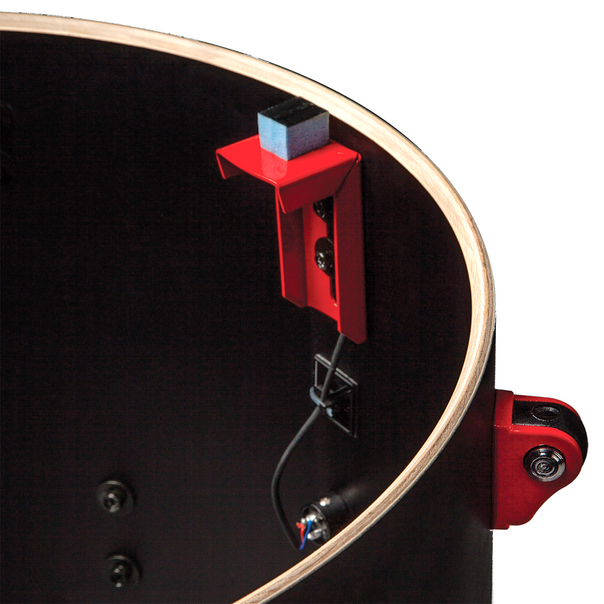 Akustilise trummi elektrooniline andur